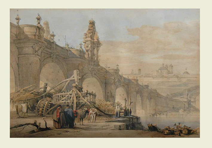 Noria del molino del Puente de Toledo, acuarela de la obra "Spanish Sketches" del pintor romántico y dibujante de origen escocés David Roberts (1796-1864), que recorrió España entre 1832 y 1833. El original está en The Royal Collection (Reino Unido).